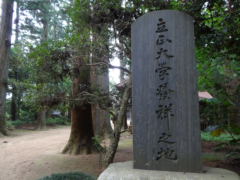 立正大学発祥の地